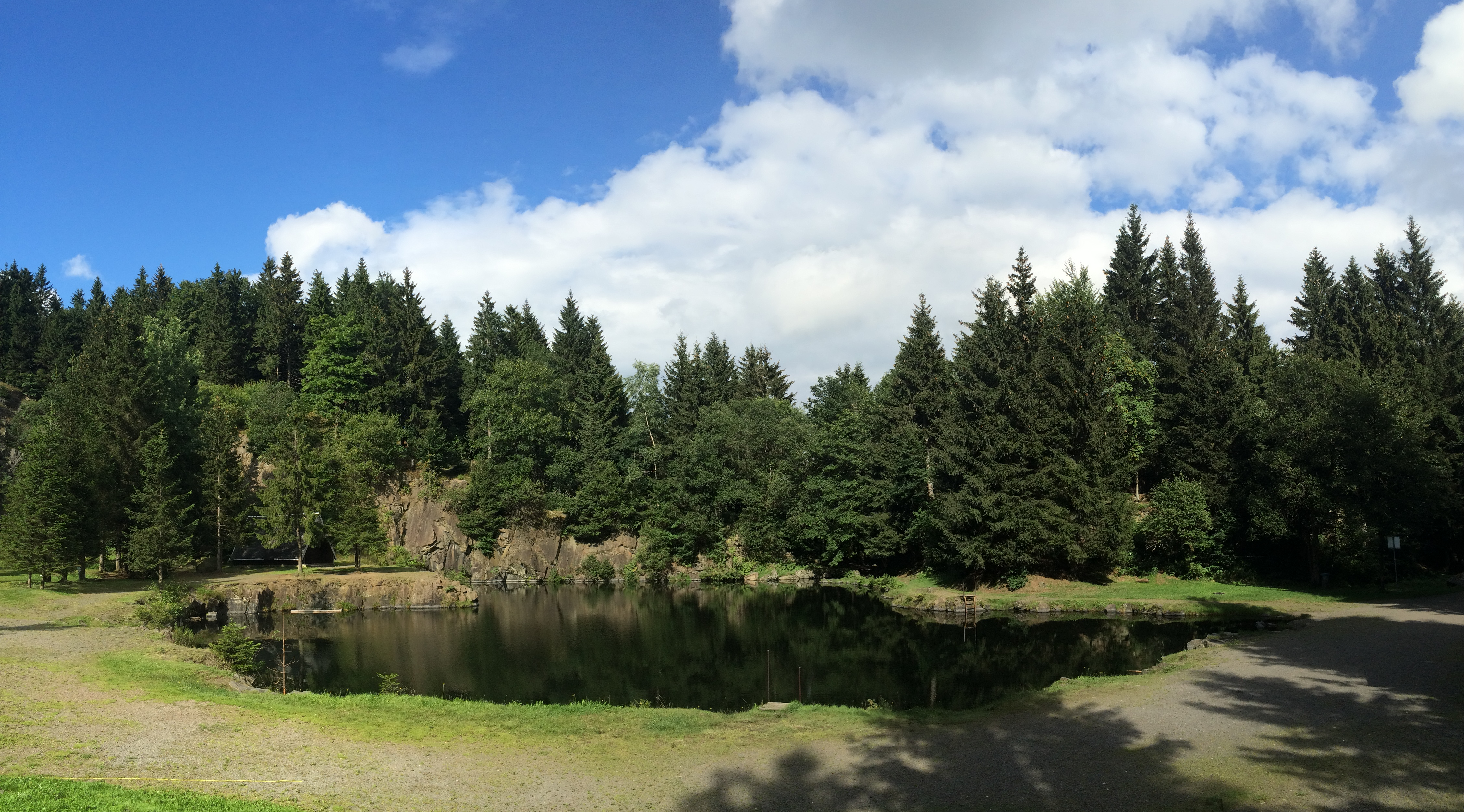 Bergsee im ehemaligen Steinbruch in der Ebertswiese